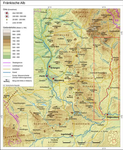 La cours de la Naab sur une carte de la Franconie